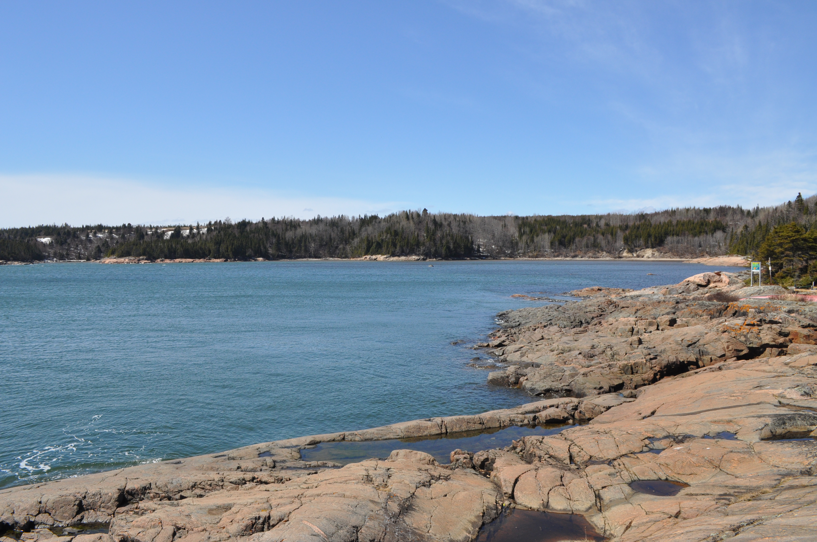 L'Anse Pipounapi à Cap-de-Bon-Désir, Bergeronnes.